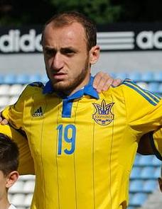 Валеріане Гвілія у фіналі Турніру пам'яті Валерія Лобановського 2015